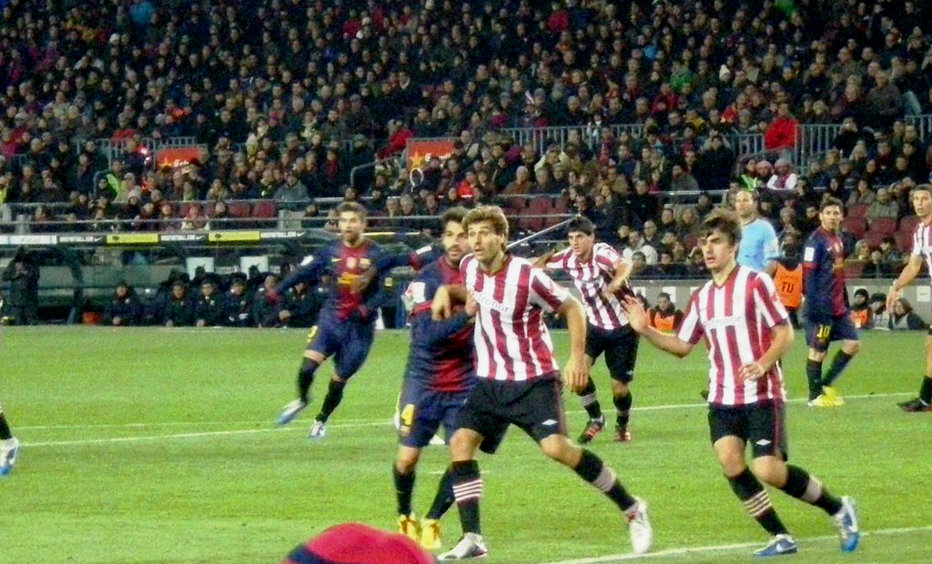 El jugador español Fernando Llorente en el Camp Nou. Barcelona-Athletic el 1 de Diciembre de 2012.